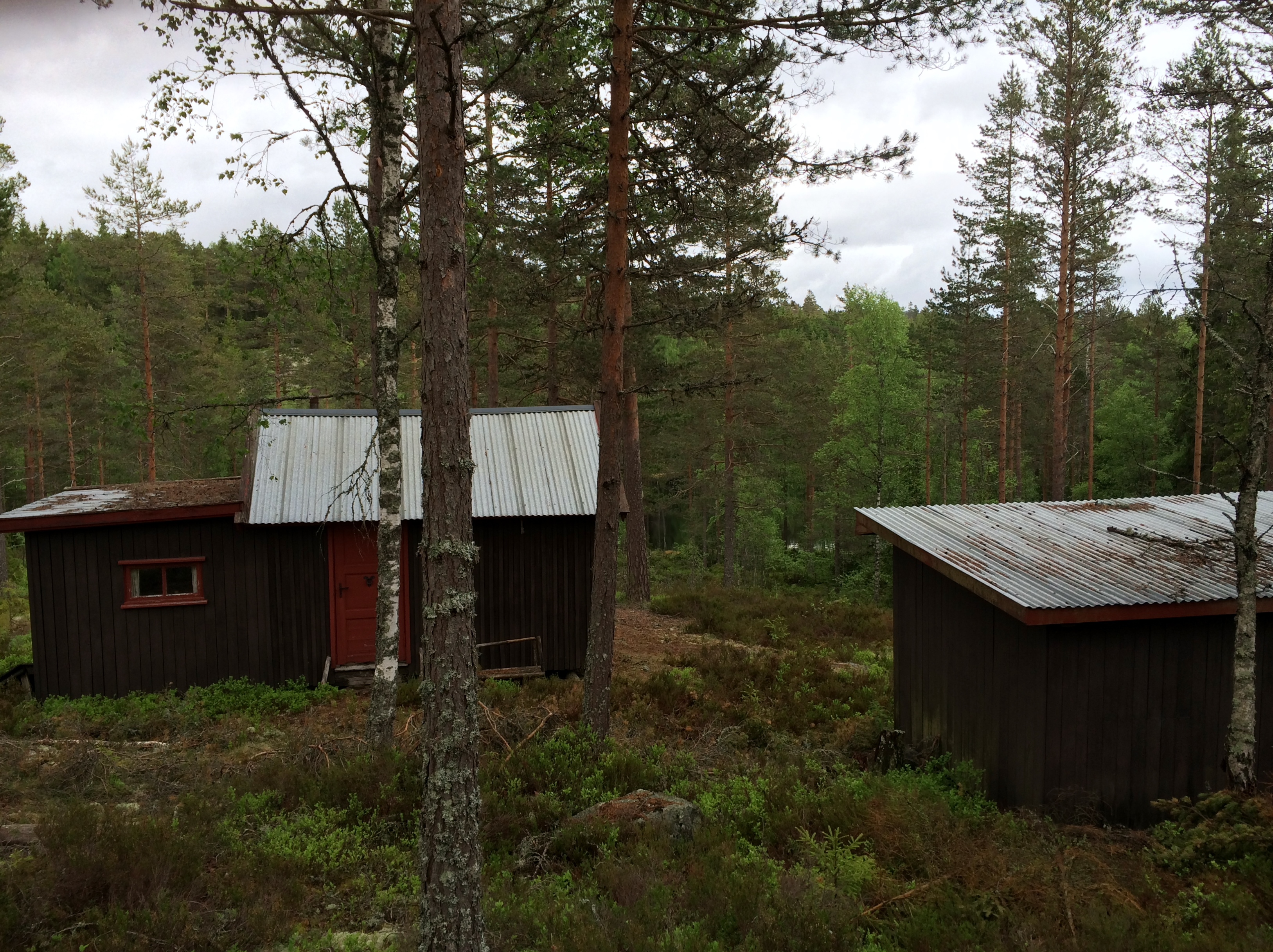 Hytta ved Gørrtjennet på Lierfoss i Aurskog-Høland kommune.